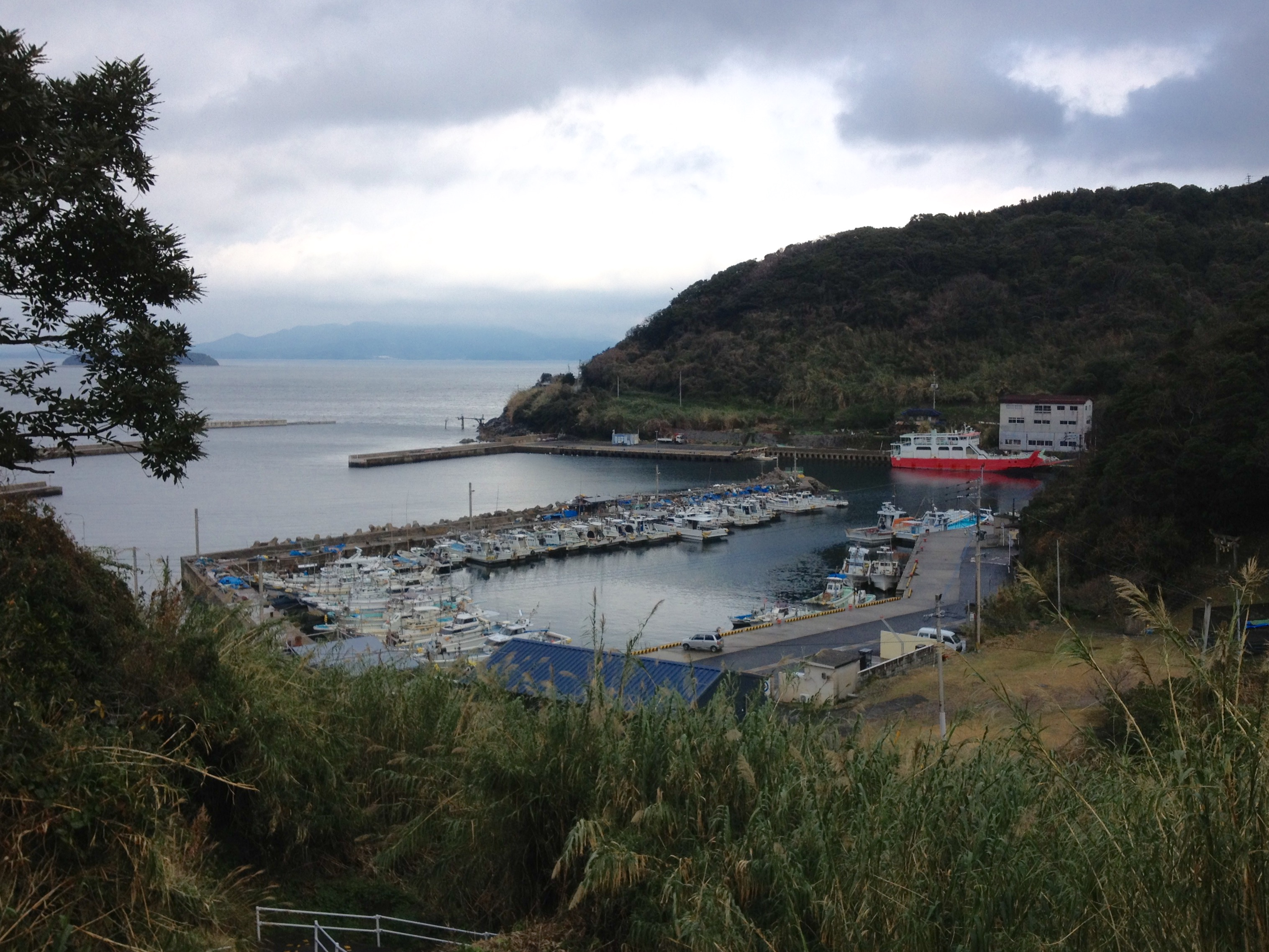 本村地区から望む黒島港